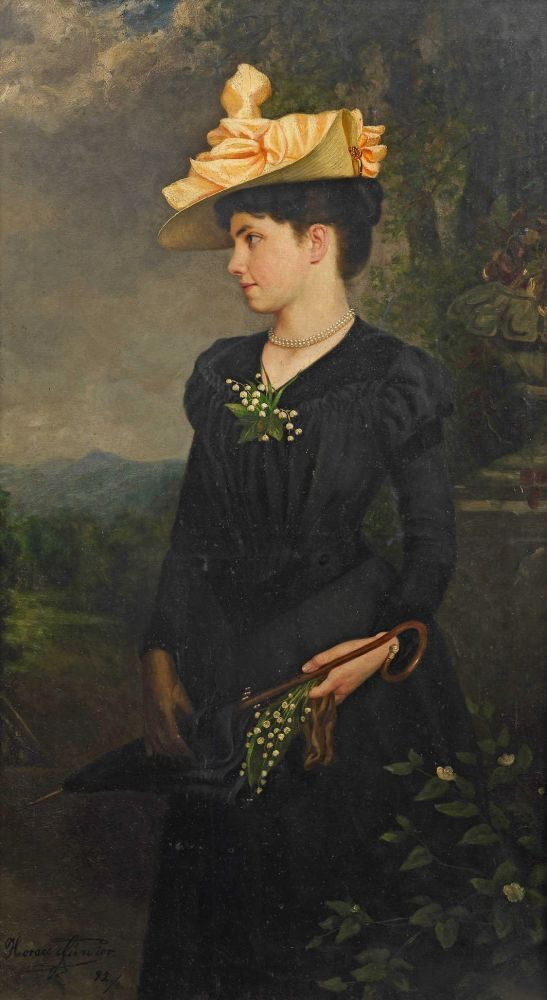 Porträt einer jungen Damen mit Hut und in schwarzer Kleidung vor einer Bergkulisse, signiert und datiert von „Horace Günter '92“ ...